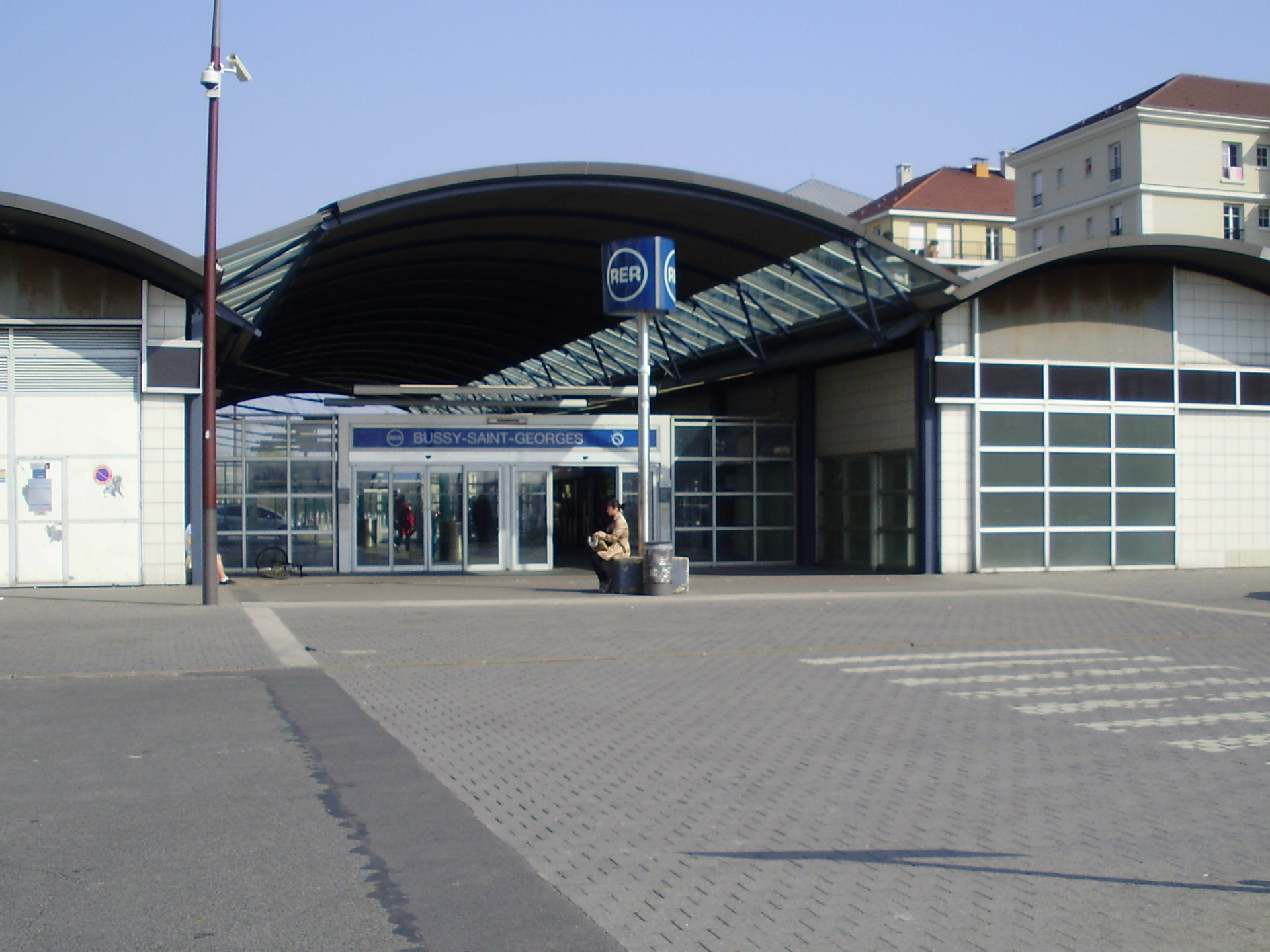 Gare de Bussy-Saint-Georges, Seine-et-Marne, France : entrée de la gare